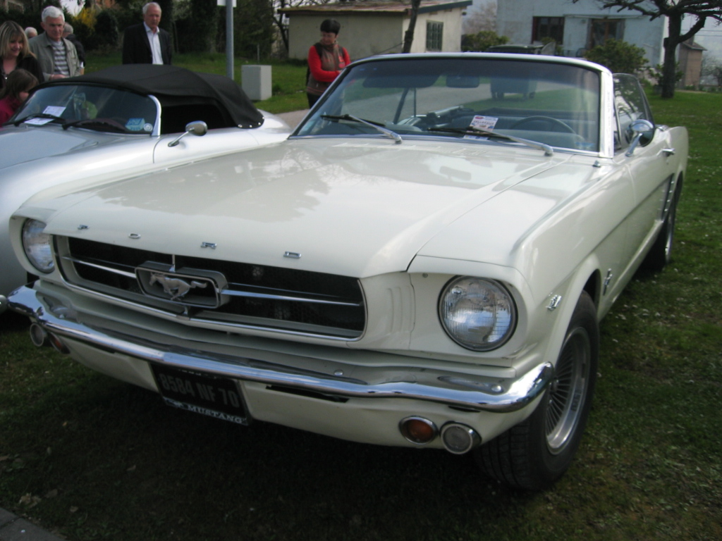 Ford Mustang 1965